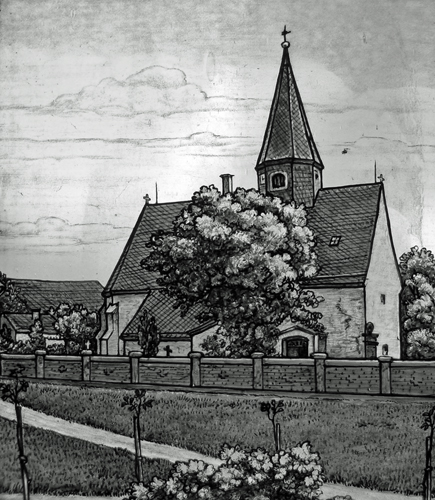 Die Kirche zu Hänichen von 1847 bis 1906 als Glasmalerei in einem Fenster der Sakristei